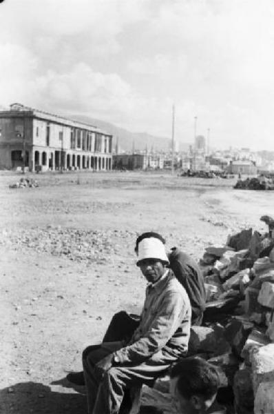 Italia Dopoguerra - Genova - Bacino San Giorgio - Coppia di camalli durante una pausa